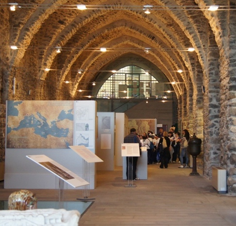 L'immagine raffigura l'interno dell'antico arsenale di Amalfi, ora sede dell'omonimo museo